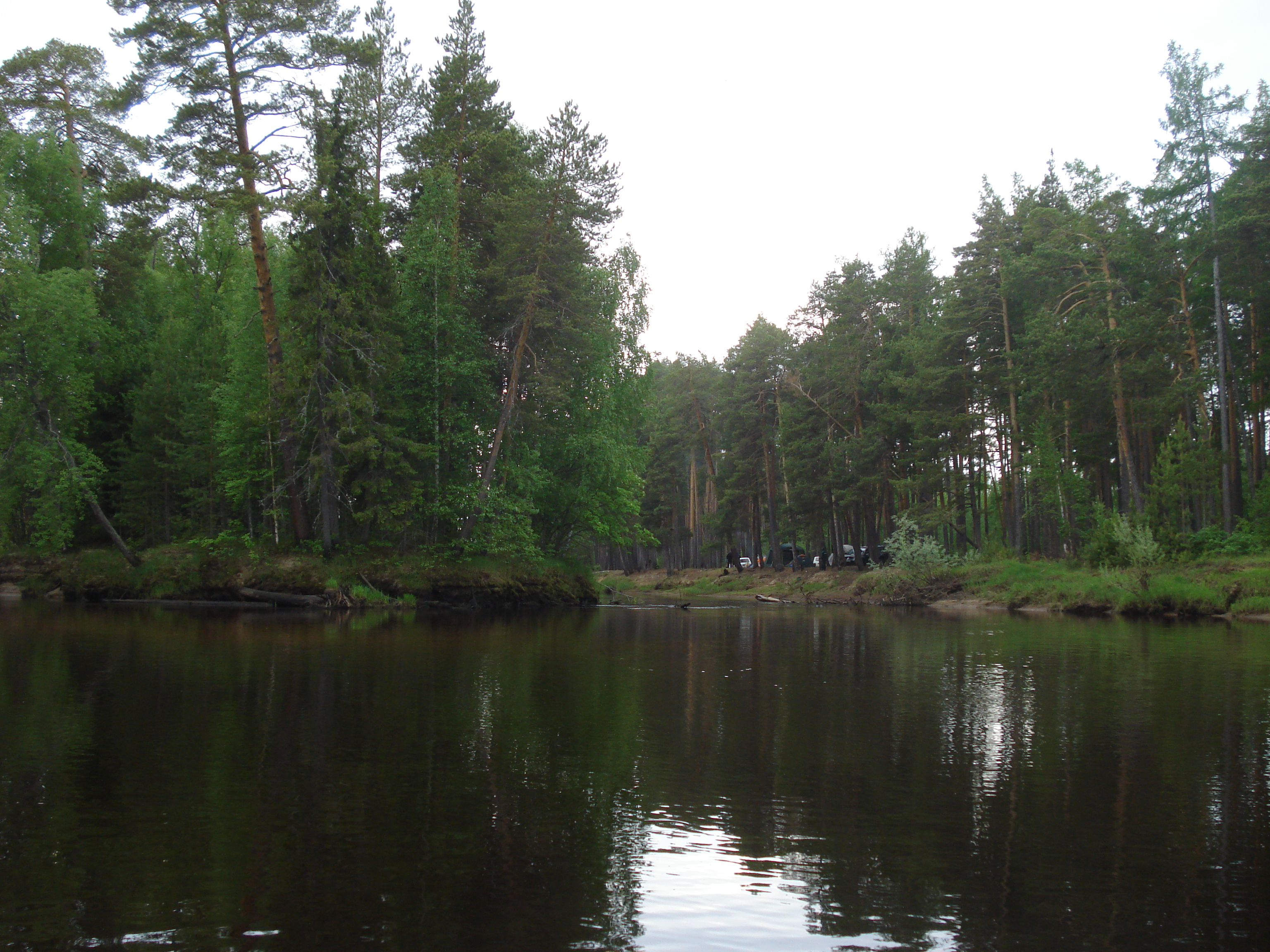 Верхне-Кондинский заказник, Советский район This image is related to the protected area of Russia number 8600013